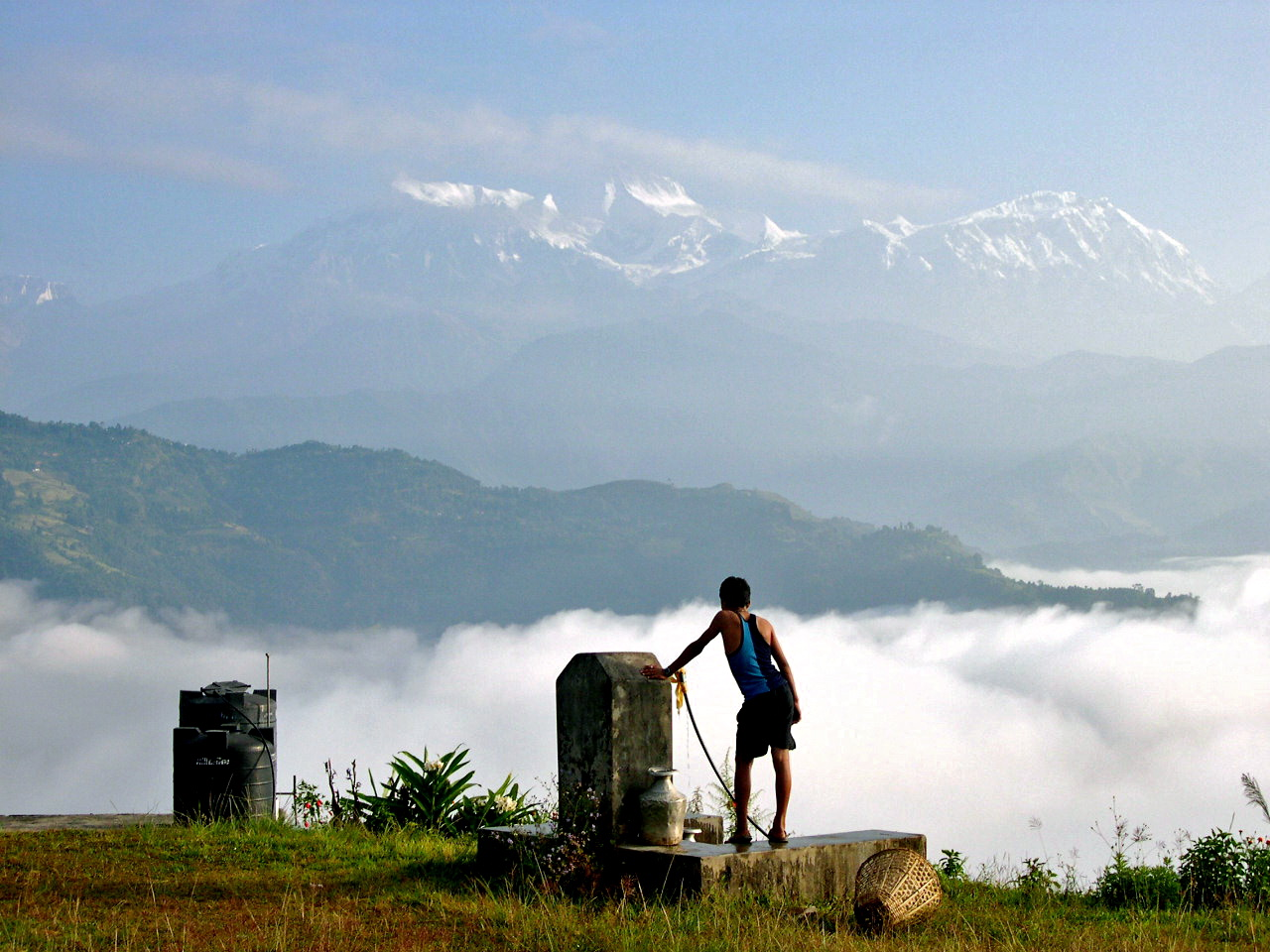 Pokarah, Nepal. Morning Hike